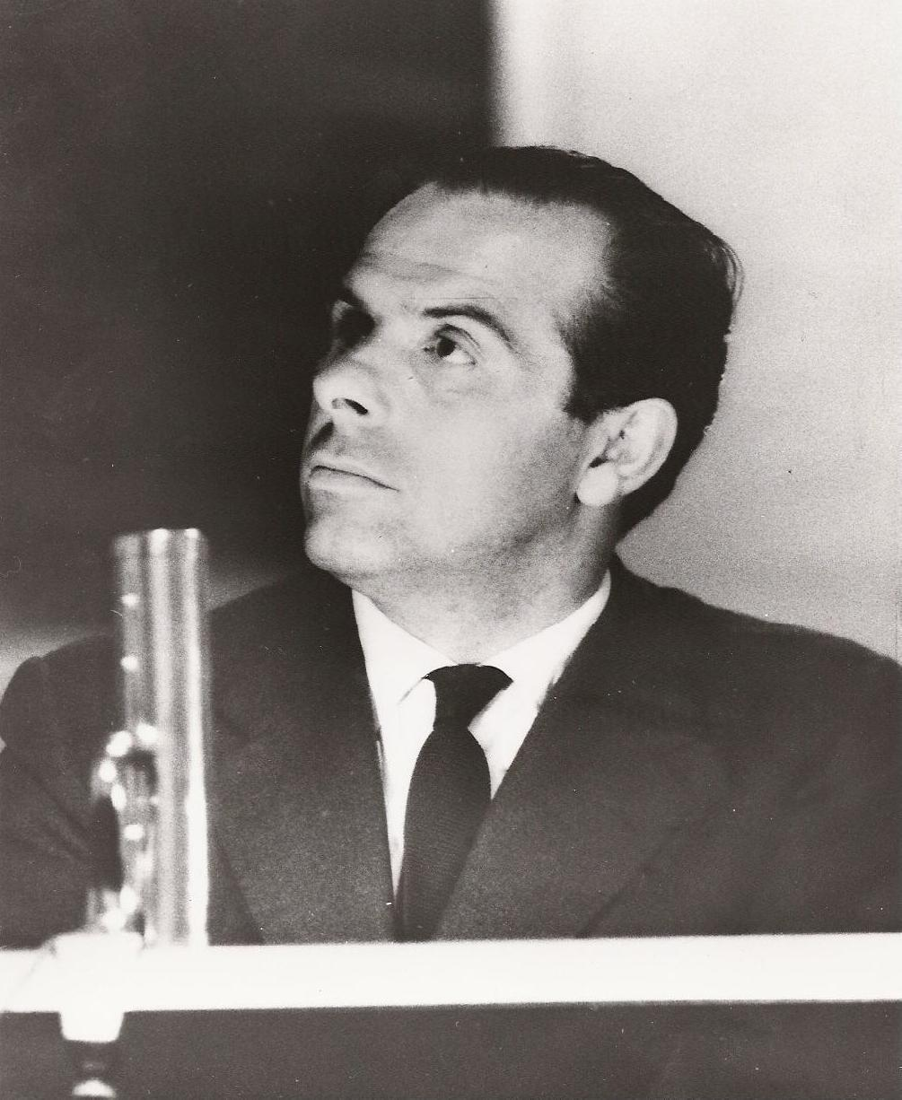 Piero Piccioni (1921—2004). Foto scansionata da archivio privato di famiglia. Sono il figlio.